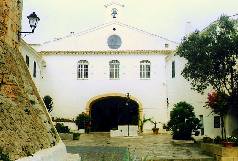 Santuari de la Mare de Déu del Toro, municipi des Mercadal, al cim de la muntanya del Toro (385 m alt), màxima elevació orogràfica de l'illa. Cal situar la fundació del santuari vers el 1288. La Mare de Déu del Toro és considerada patrona de Menorca des de segles